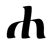 хаут эфиопия